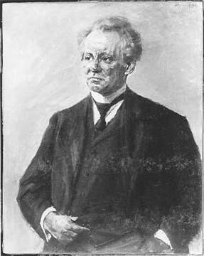 Porträt Ludwig Borchard von Max Liebermann, Öl auf Leinwand, 89 x 71 cm.